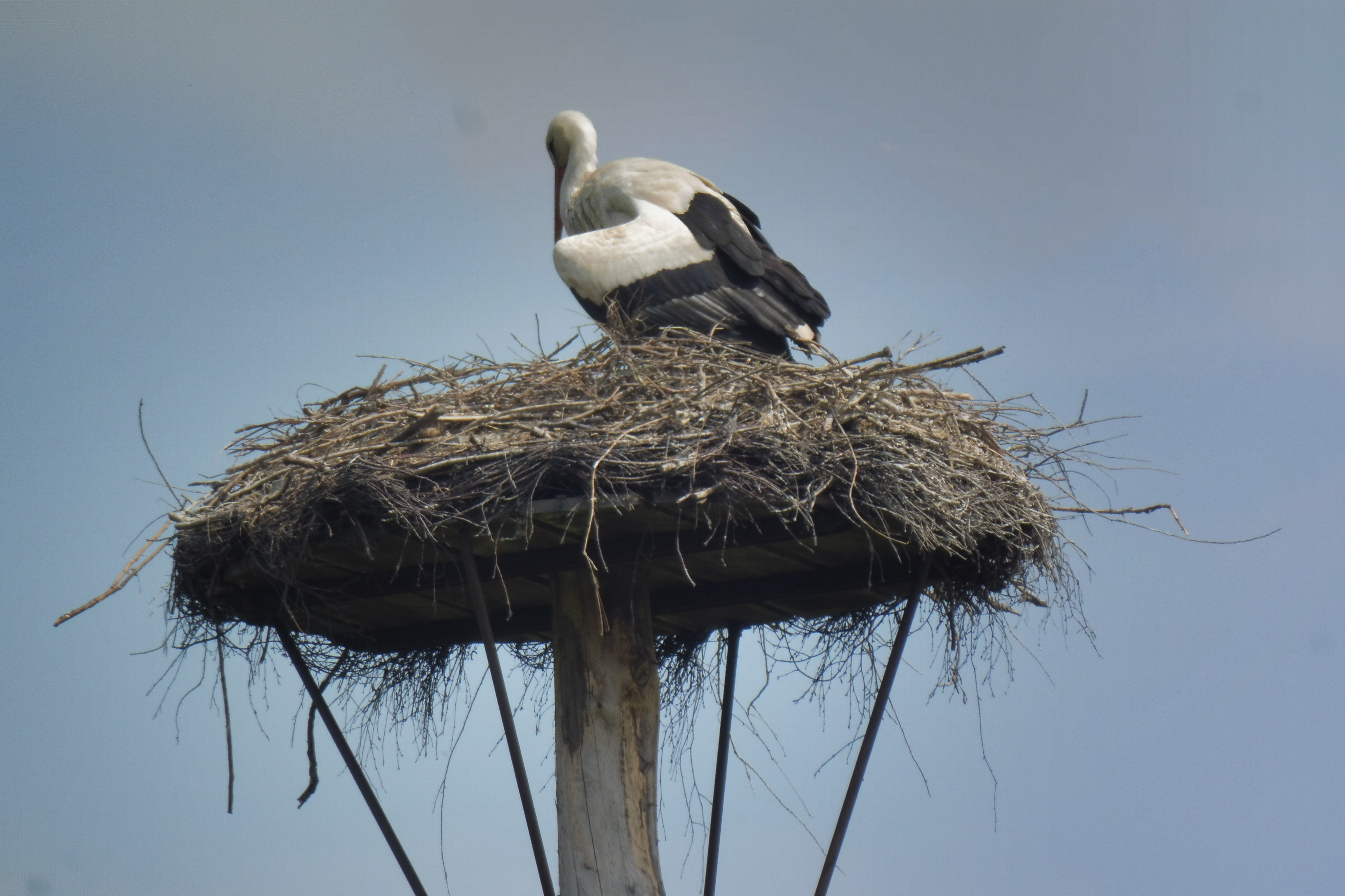 Storchennest im Heitwinkel (LSG Büren)